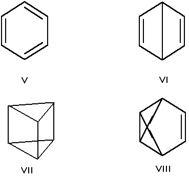 Izomer002